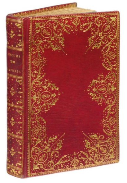 amours de chloé